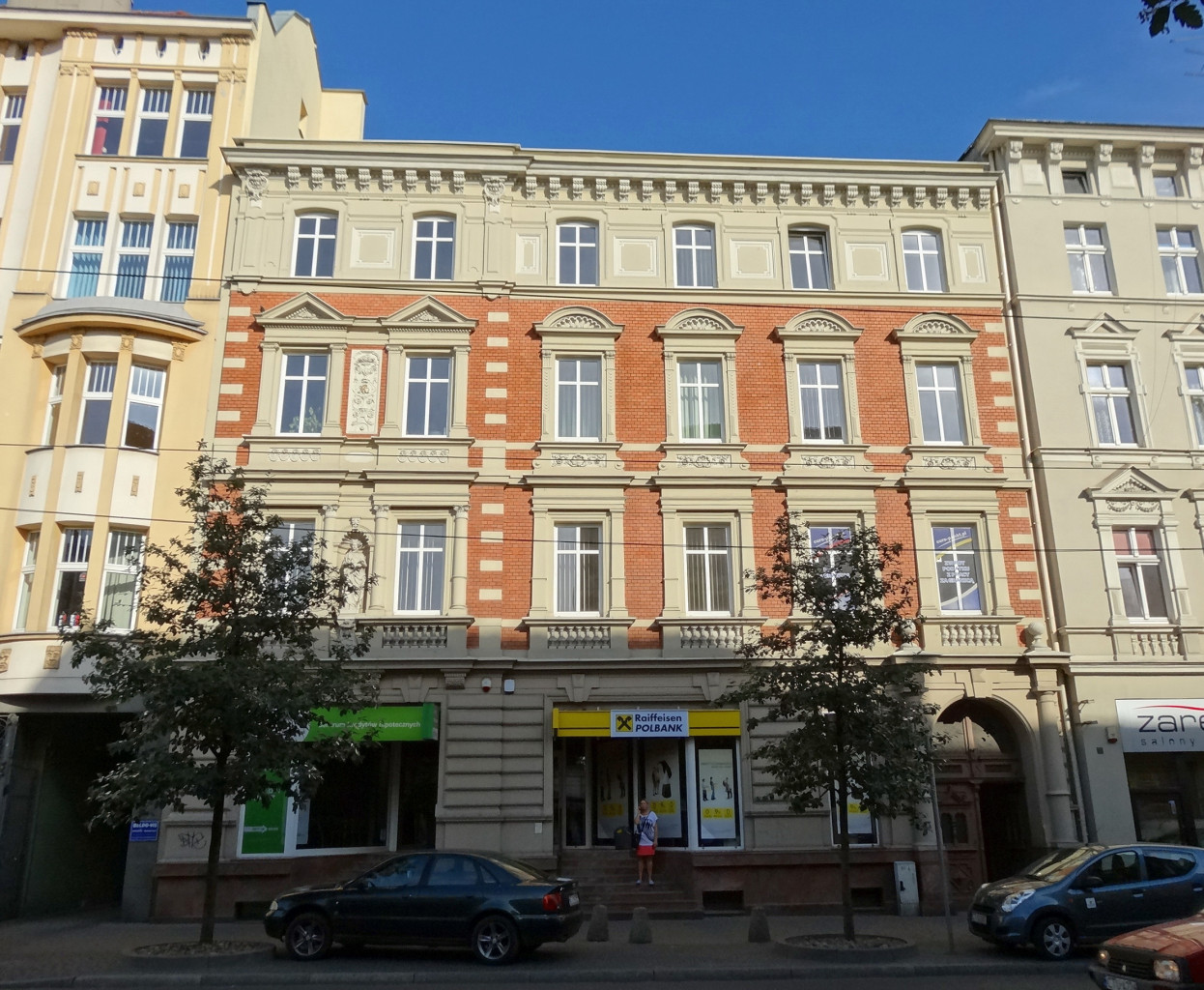 Kamienica przy ul. Gdańskiej 60 w Bydgoszczy